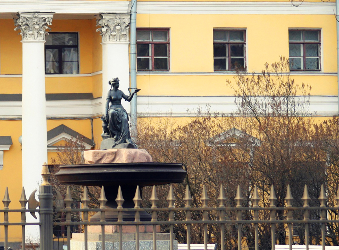 Фонтан «Гигиея» (Санкт-Петербург, Академика Лебедева улица, 6)